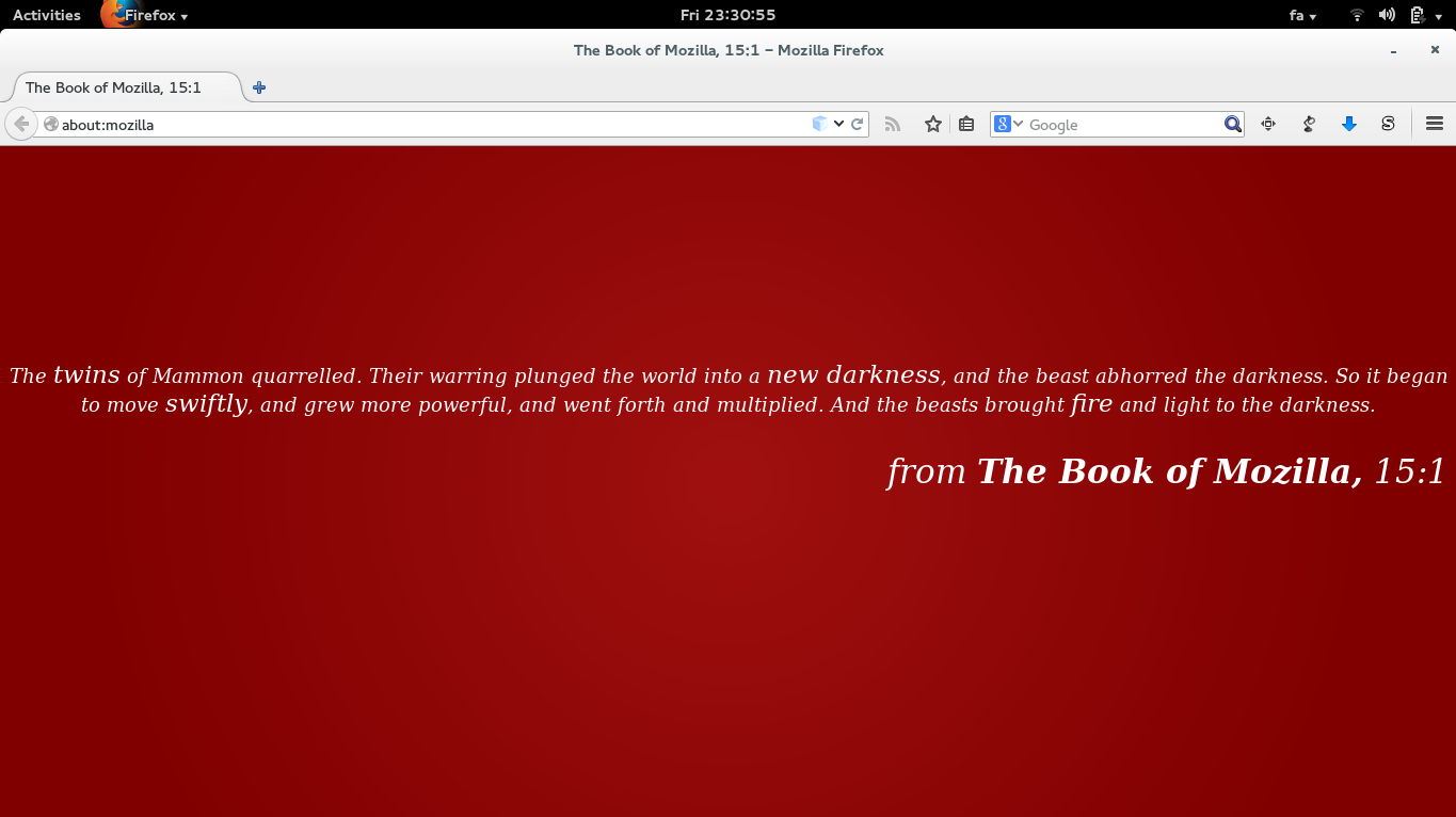 کتاب موزیلا، ۱۵:۱ در گنوم ۳